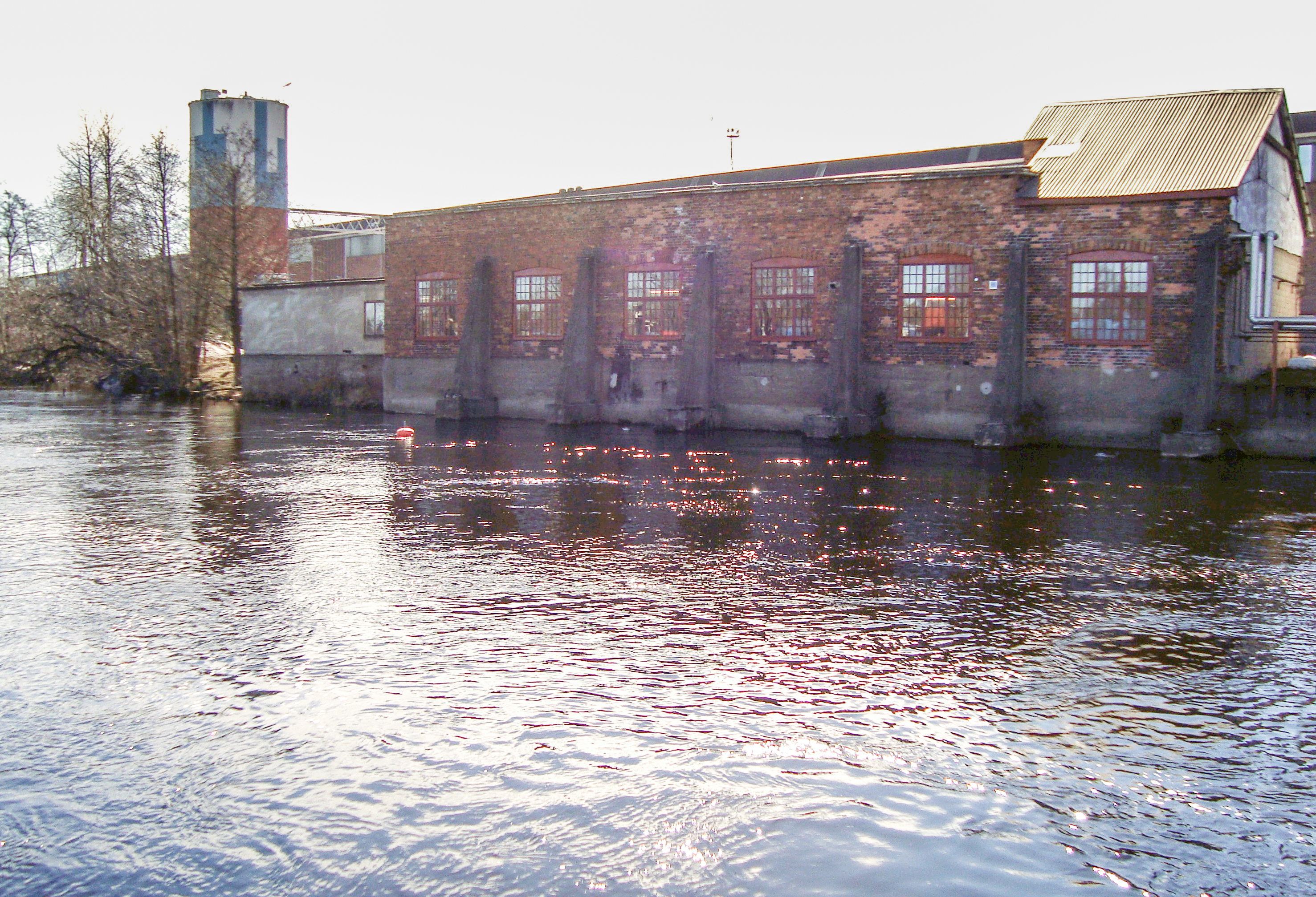 Smedjebackens valsverk/Ovako vid Smedjebackens hamn.